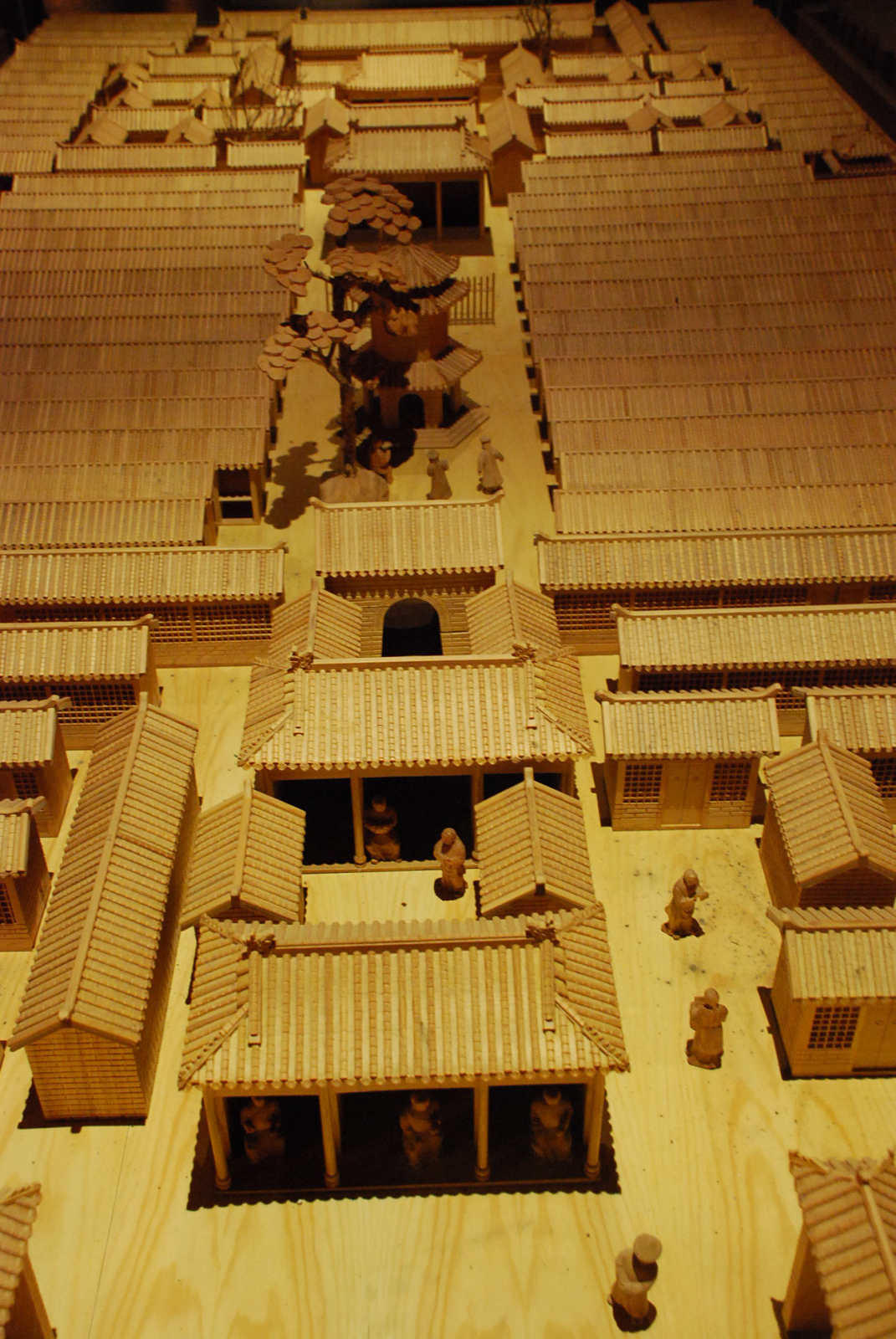 贡院号舍模型。